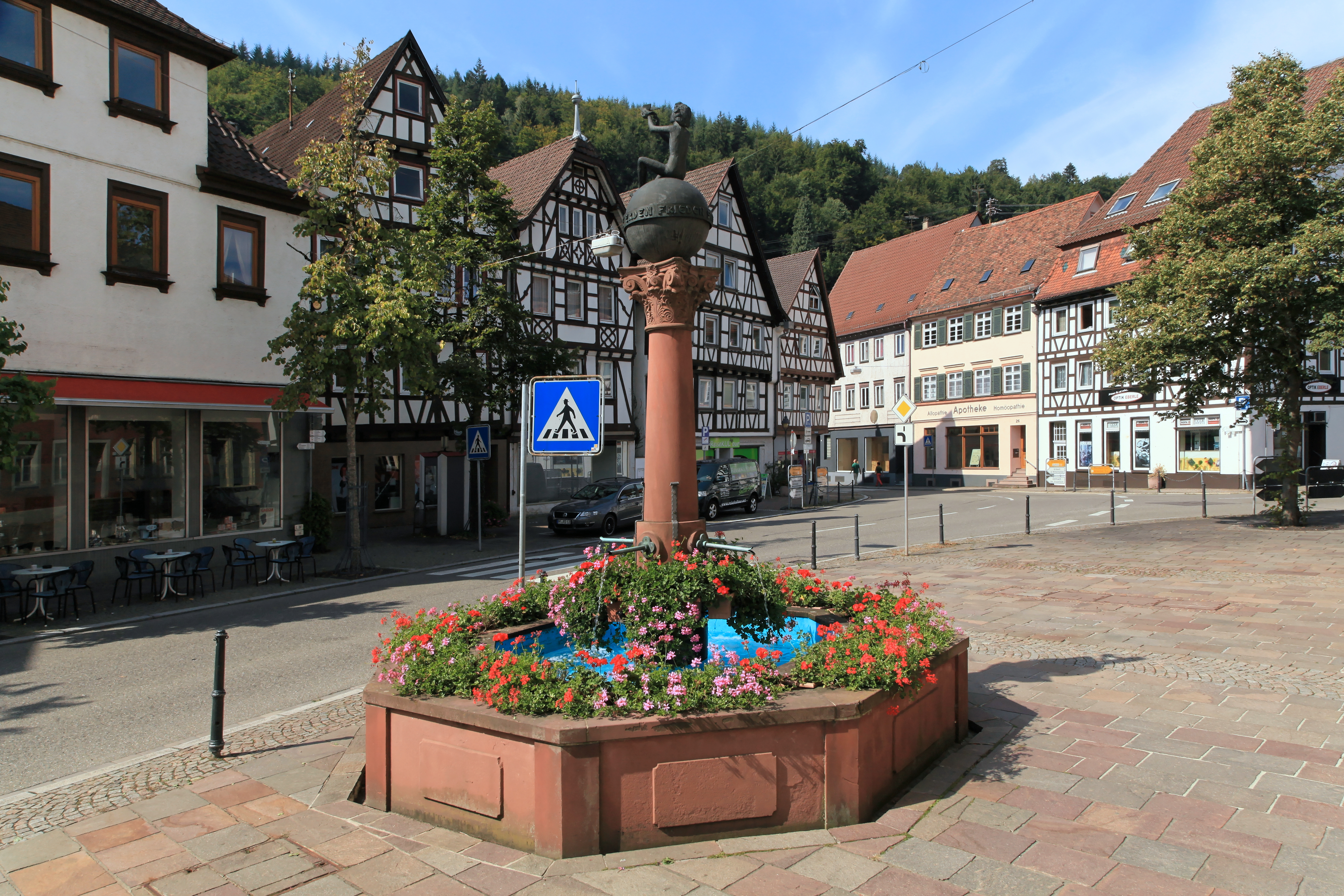 Marktbrunnen an Marktstraße / Marktplatz in Neuenbürg